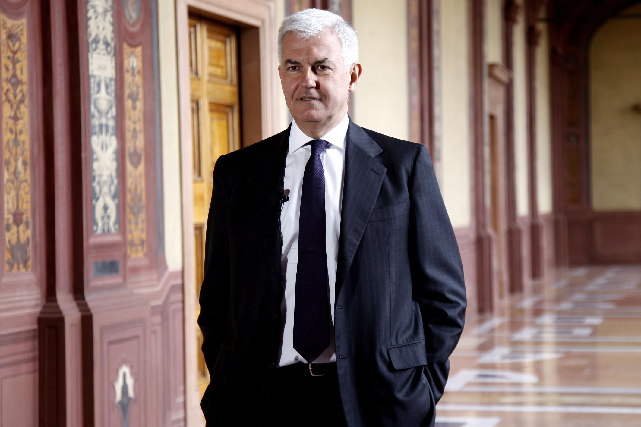 Alessandro Profumo nella Galleria Peruzziana in Rocca Salimbeni